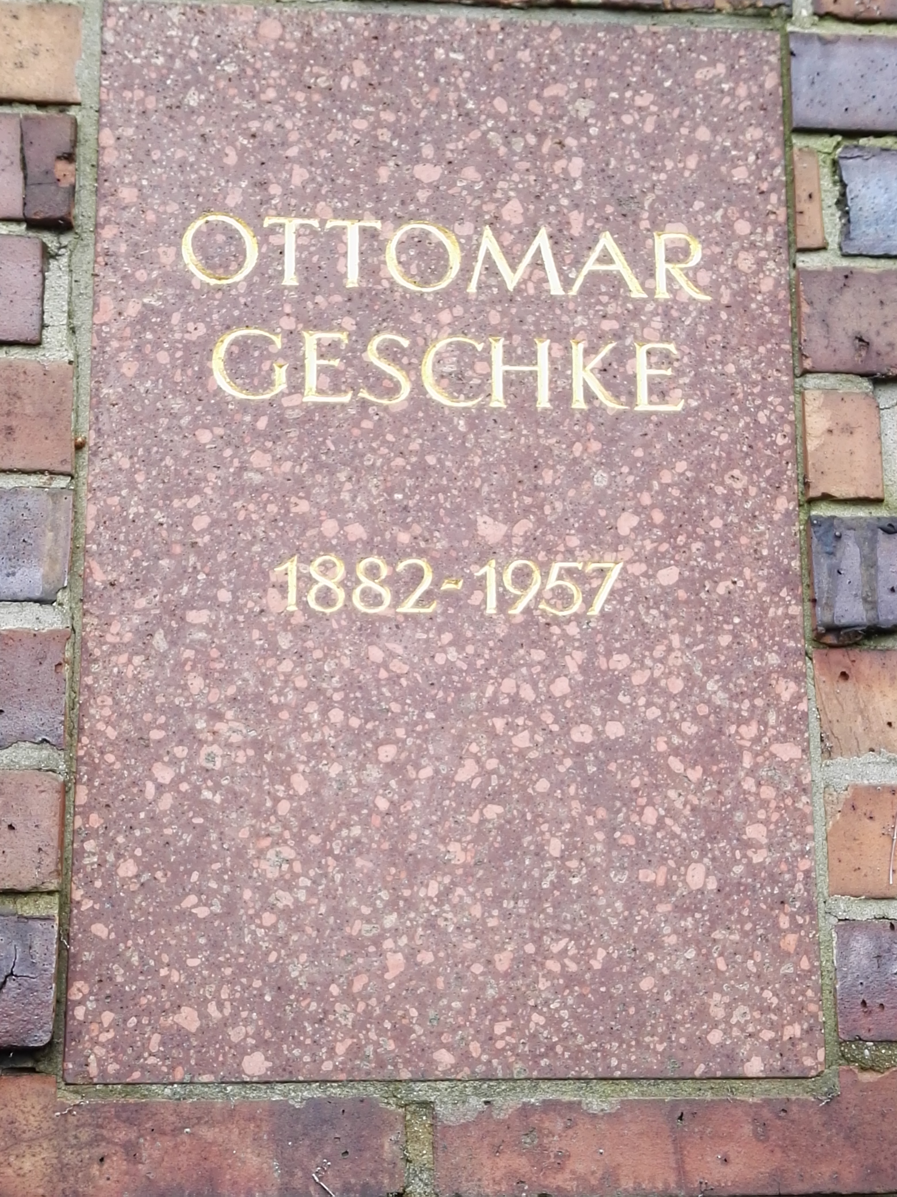 Grab von Ottomar Geschke in der Gedenkstätte der Sozialisten auf dem Zentralfriedhof Friedrichsfelde in Berlin-Lichtenberg